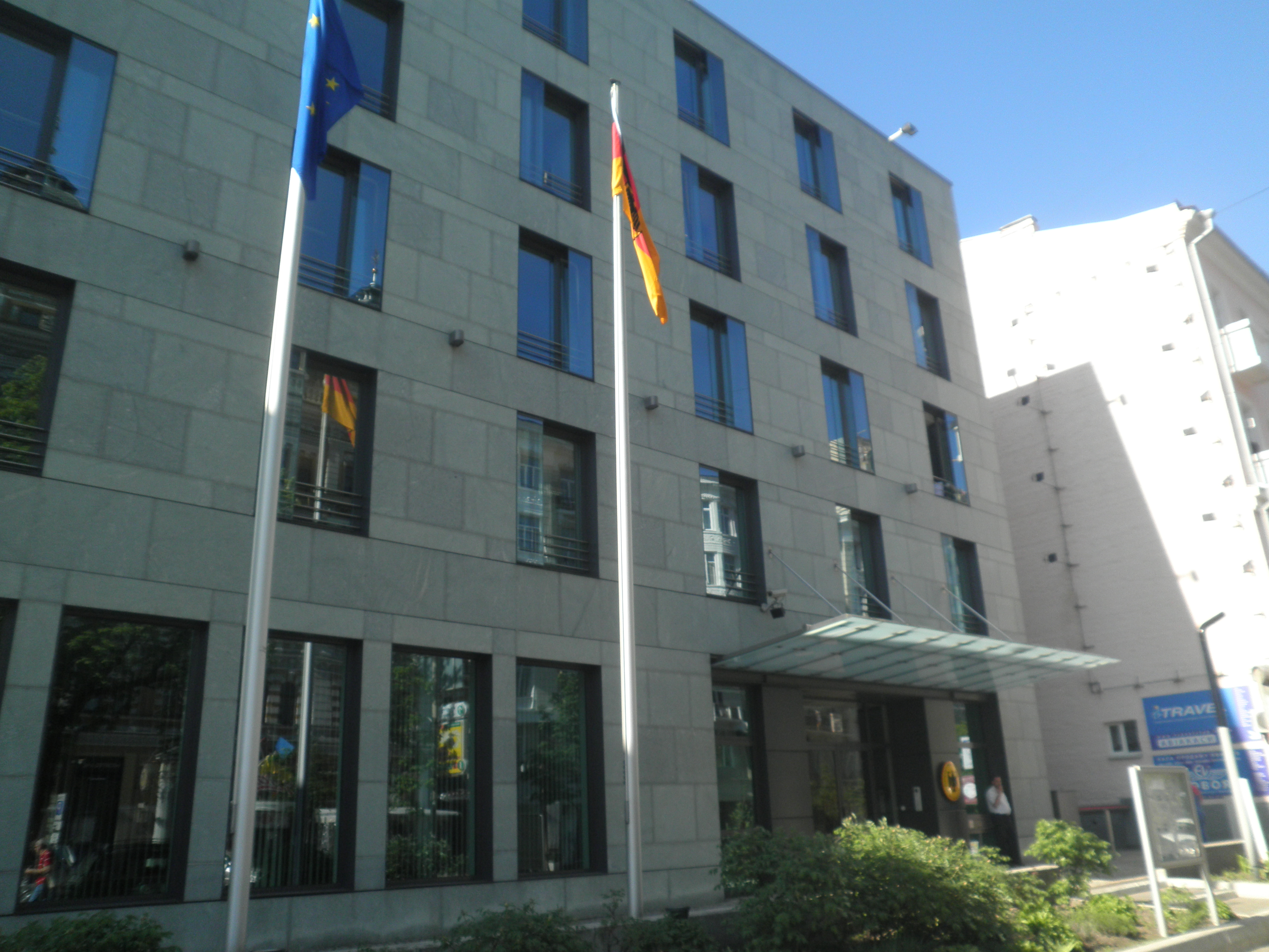 Посольство Німеччини в Києві